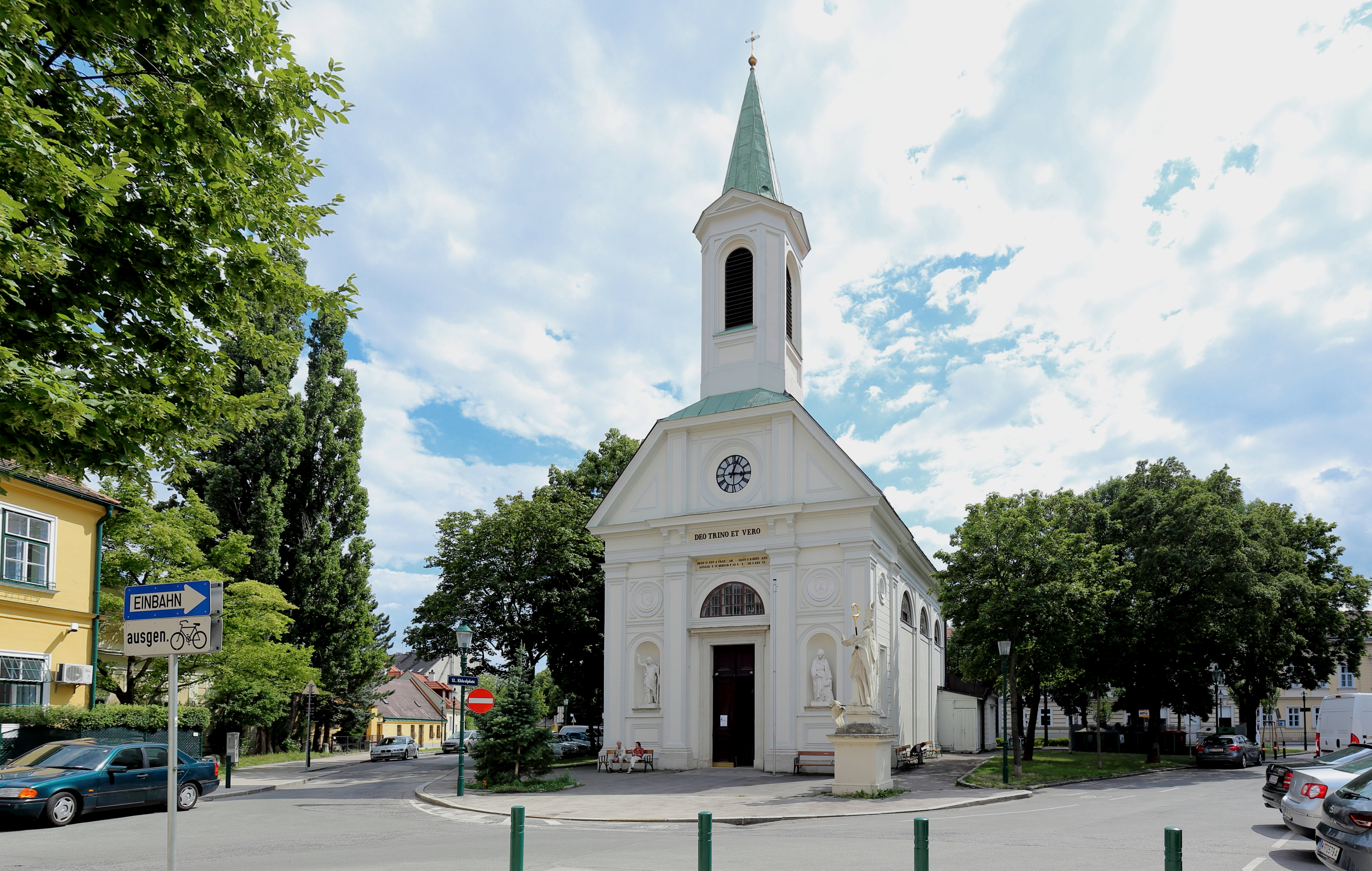 Die Pfarrkirche hl. Oswald am Khleslplatz in Altmannsdorf, ein Bezirksteil des 12. Wiener Gemeindebezirkes Meidling.Die einschiffige Kirche mit geradem Chorabschluss wurde in den Jahren 1838/39 nach den Plänen des Architekten Franz Lößl errichtet. Die Statuen an der Portalfassade stellen die Namenspatrone (Johannes der Täufer und Anna) der Kirchenstifter Johann Baptist Hoffmann und seine Gattin Anna Stiberger dar.